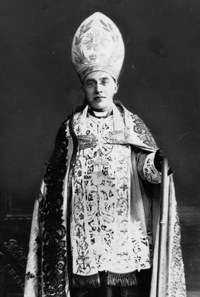 Biskup Henryk Przeździecki